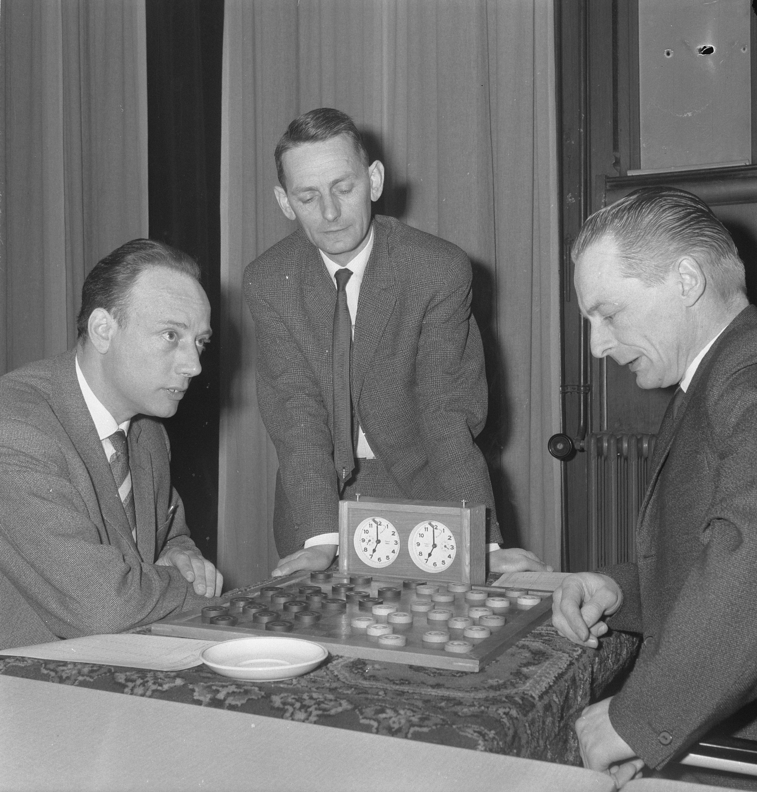 Collectie / Archief : Fotocollectie Anefo Reportage / Serie : [ onbekend ] Beschrijving : Kampioenschap dammen van Nederland 1964, in restaurant De Kroon te Amsterdam, links drs. P. Roozenburg midden staande W. de Jong en rechts Van de Sluis waar [tekst afgebroken Datum : 13 maart 1964 Locatie : Amsterdam, Noord-Holland Trefwoorden : dammen, sport Persoonsnaam : Jong, W. de, Roozenburg, P., Sluis, van de Fotograaf : Nijs, Jac. de / Anefo Auteursrechthebbende : Nationaal Archief Materiaalsoort : Negatief (zwart/wit) Nummer archiefinventaris : bekijk toegang 2.24.01.03 Bestanddeelnummer : 916-1754